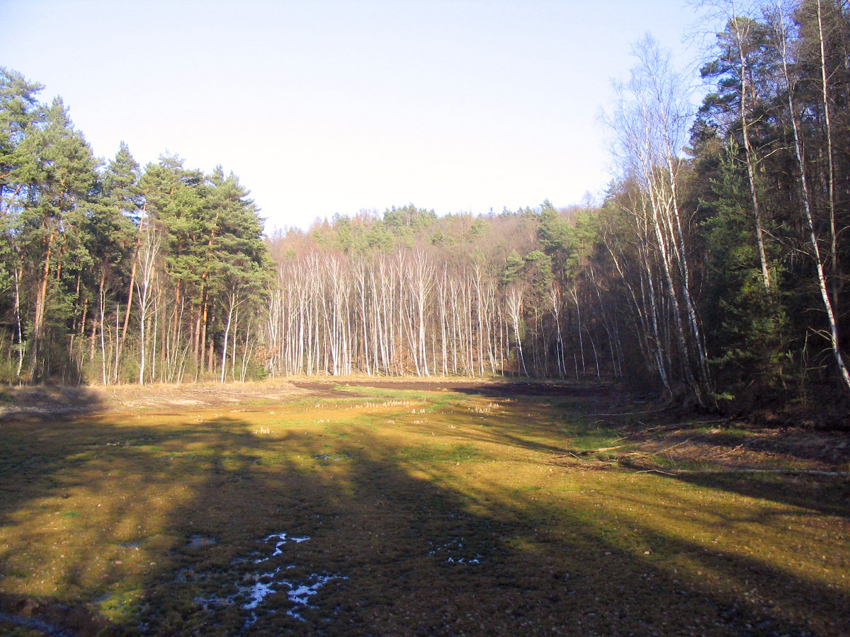 Vypuštěný rybník Vydymáček z bolevecké rybniční soustavy v Plzni v průběhu rekonstrukce hráze.